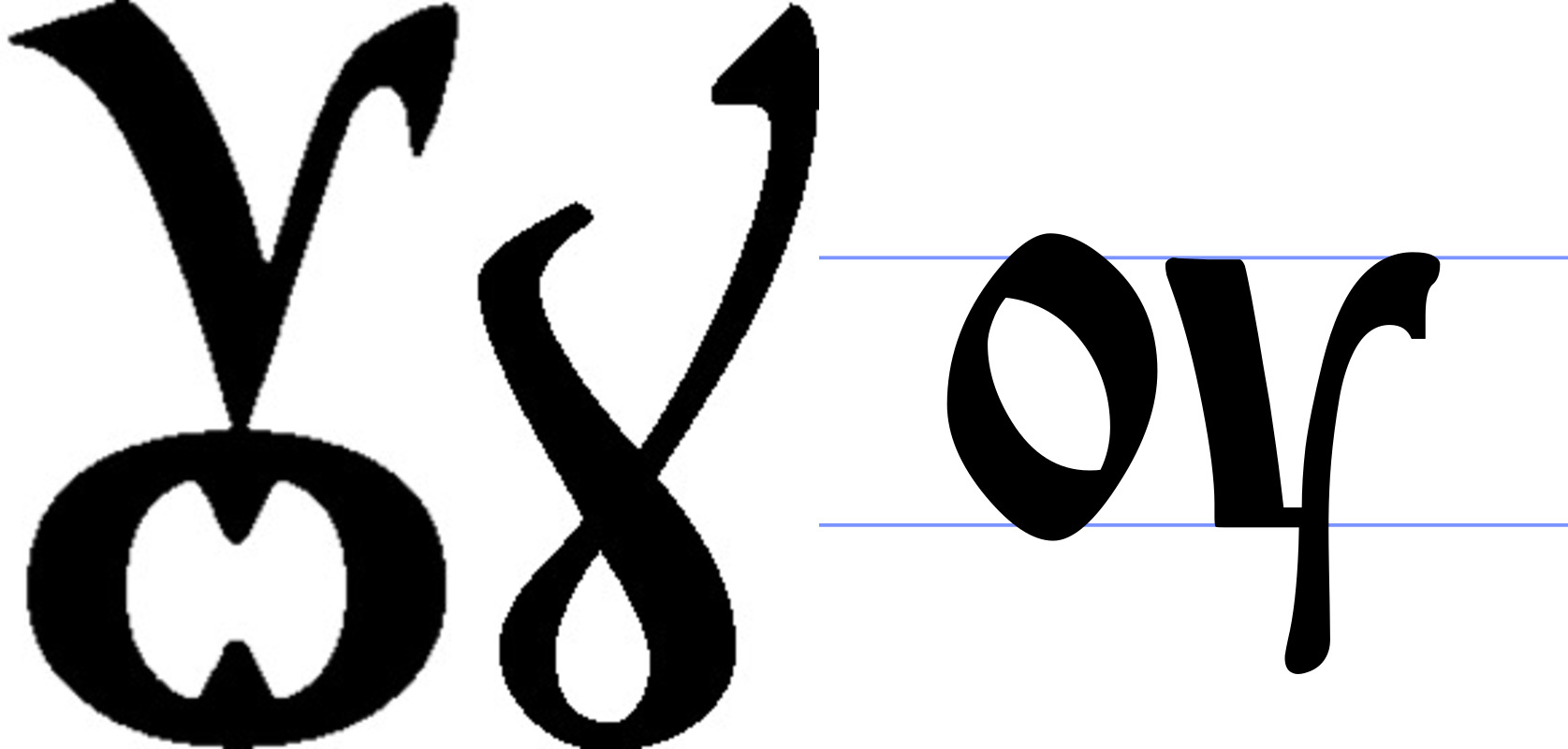 два варианта написания буквы "ОУк" на основе кириллицы в церковнославянском языке